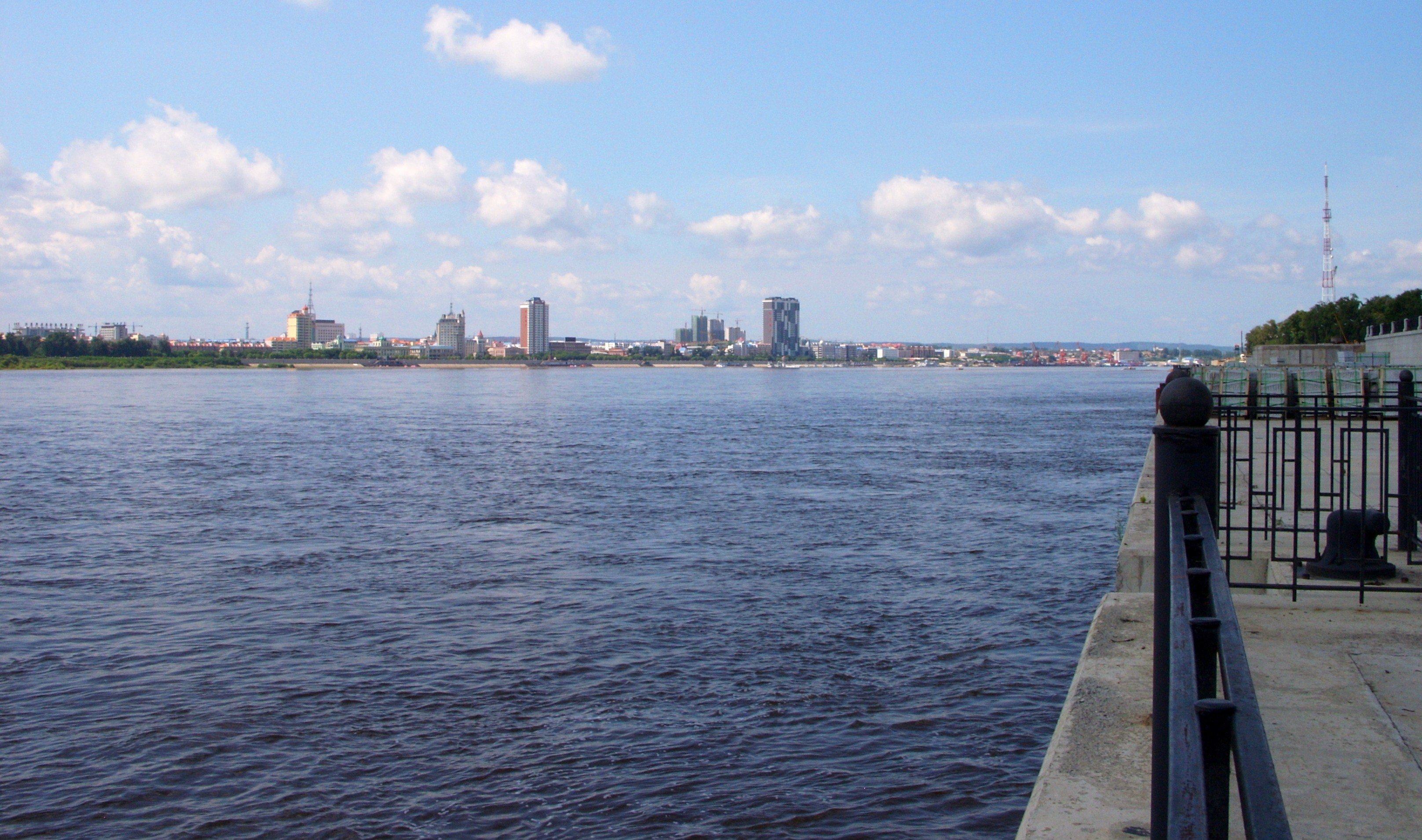 Амурская область, Россия. Снимки августа 2011 г.